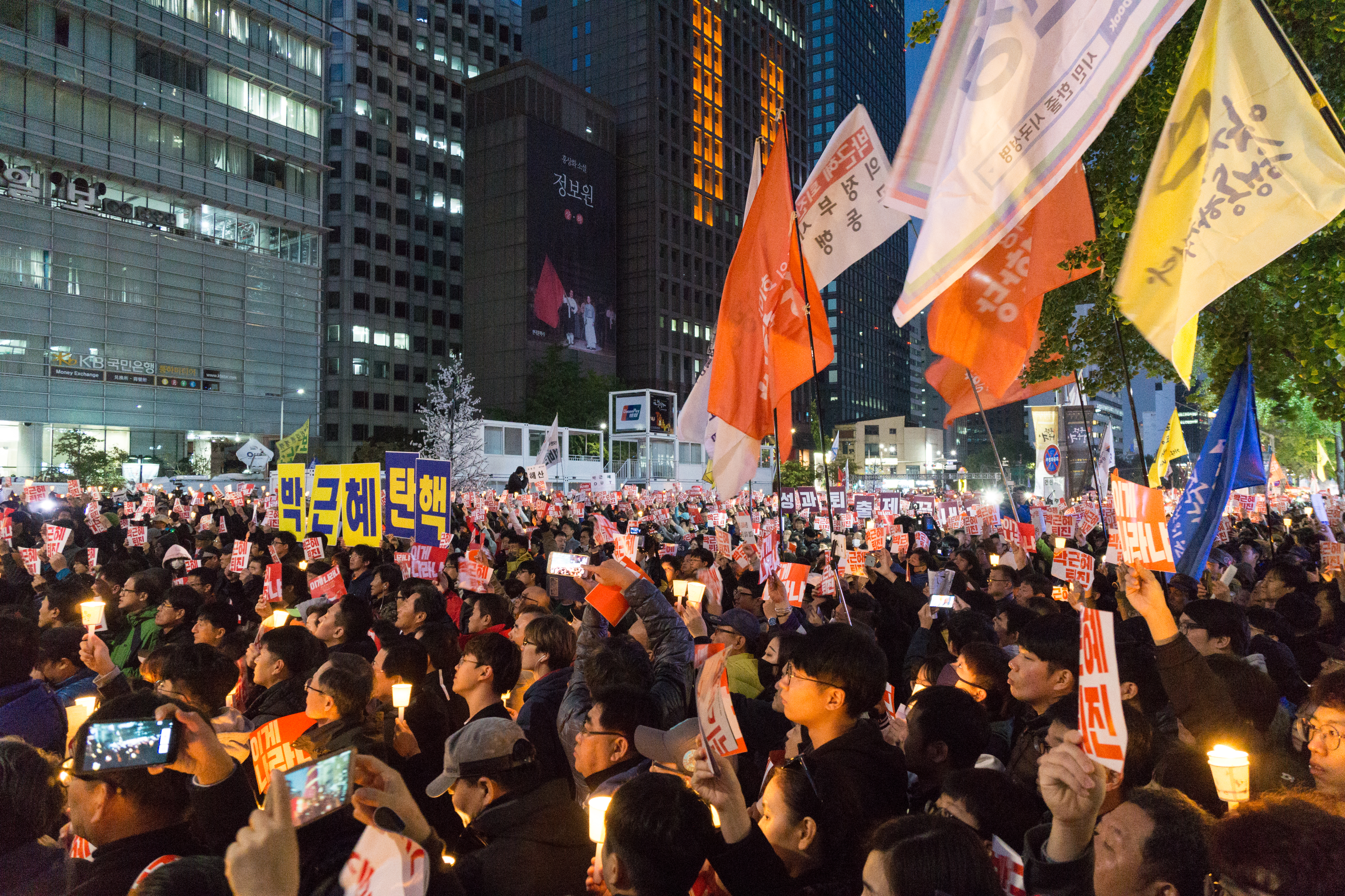 박근혜 퇴진을 요구하는 10월 29일 서울 도심의 시위대